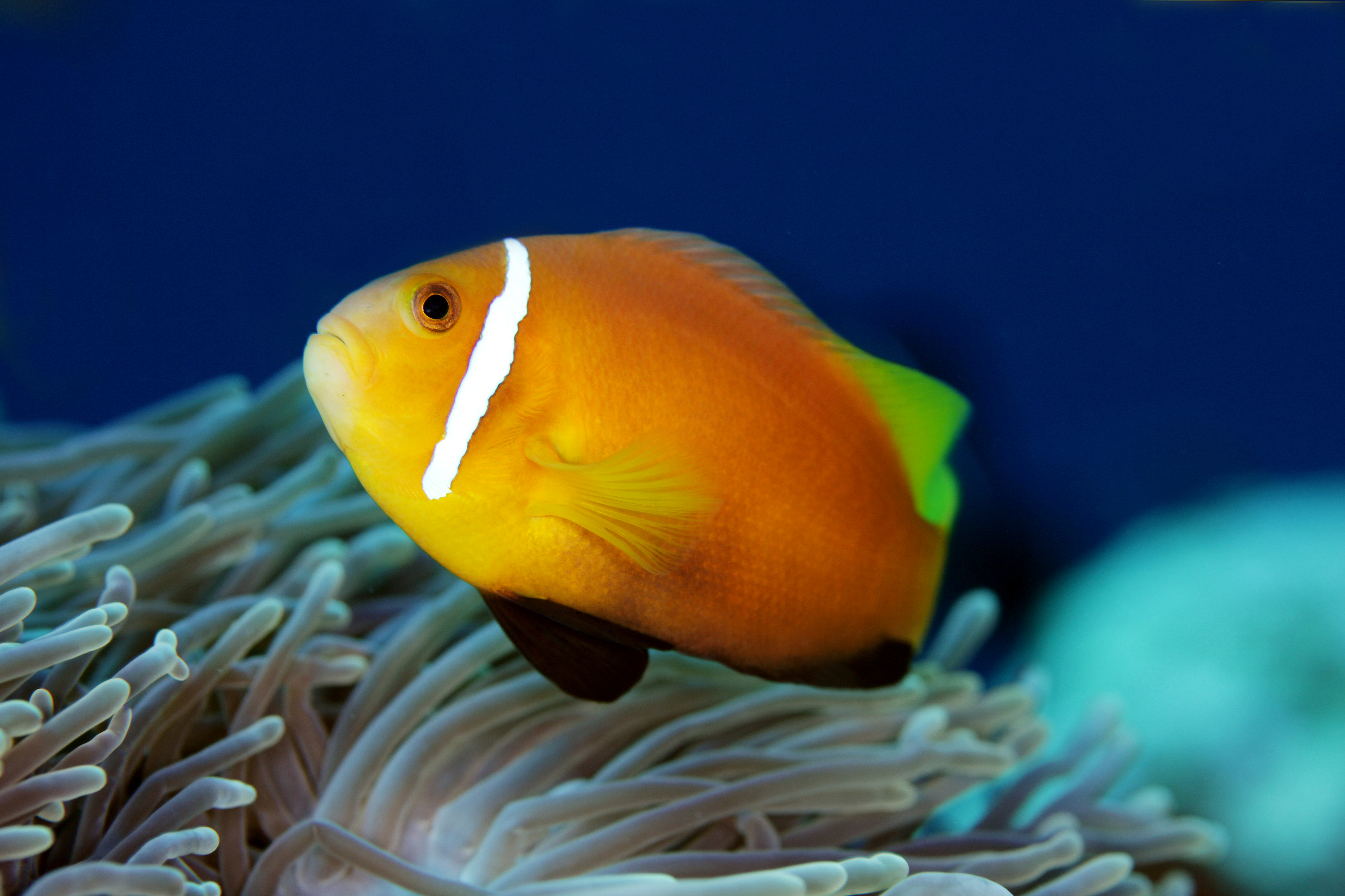 Un poisson-clown des Maldives (Amphiprion nigripes) aux Maldives (atoll de Baa).